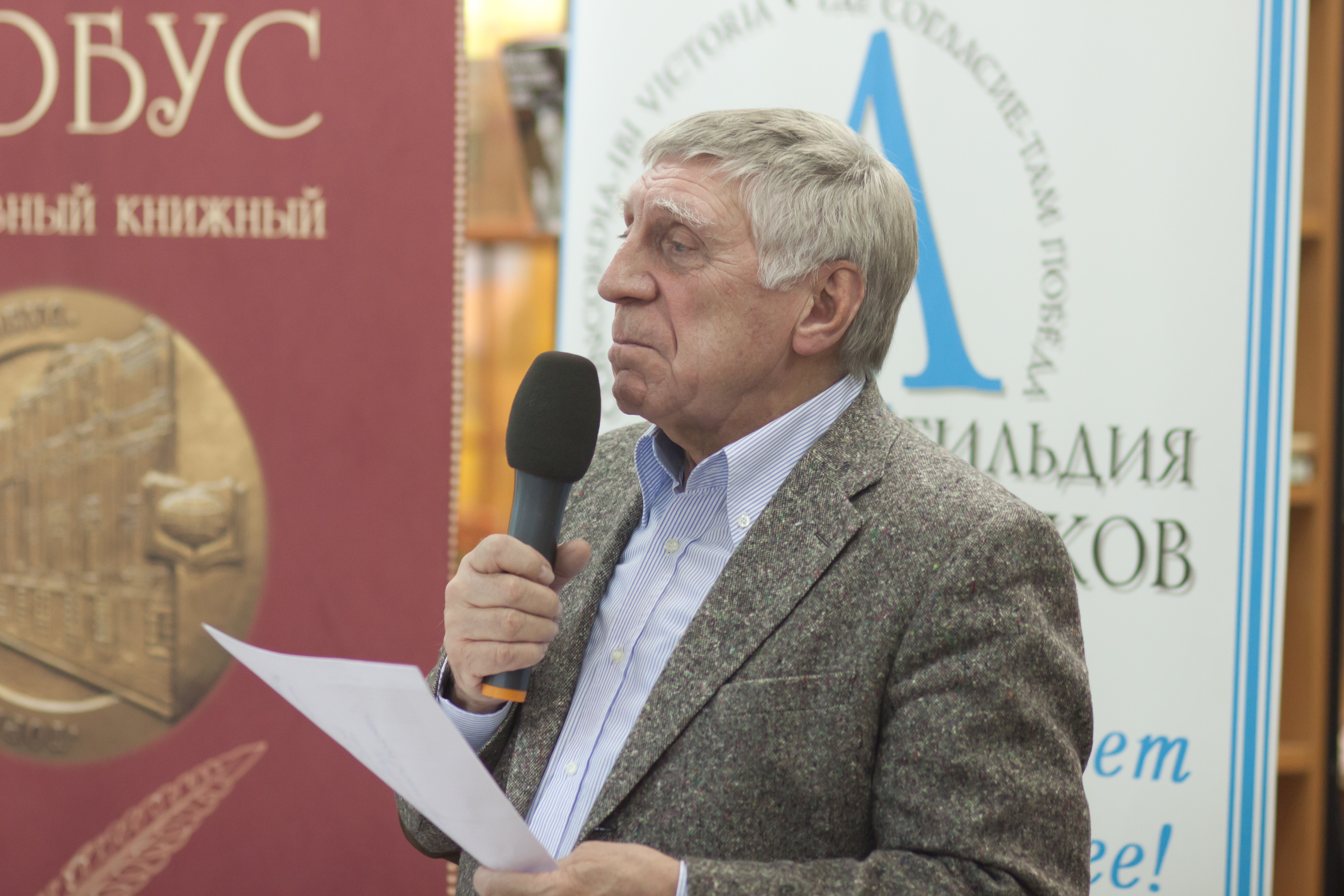 Поэт Игорь Кохановский